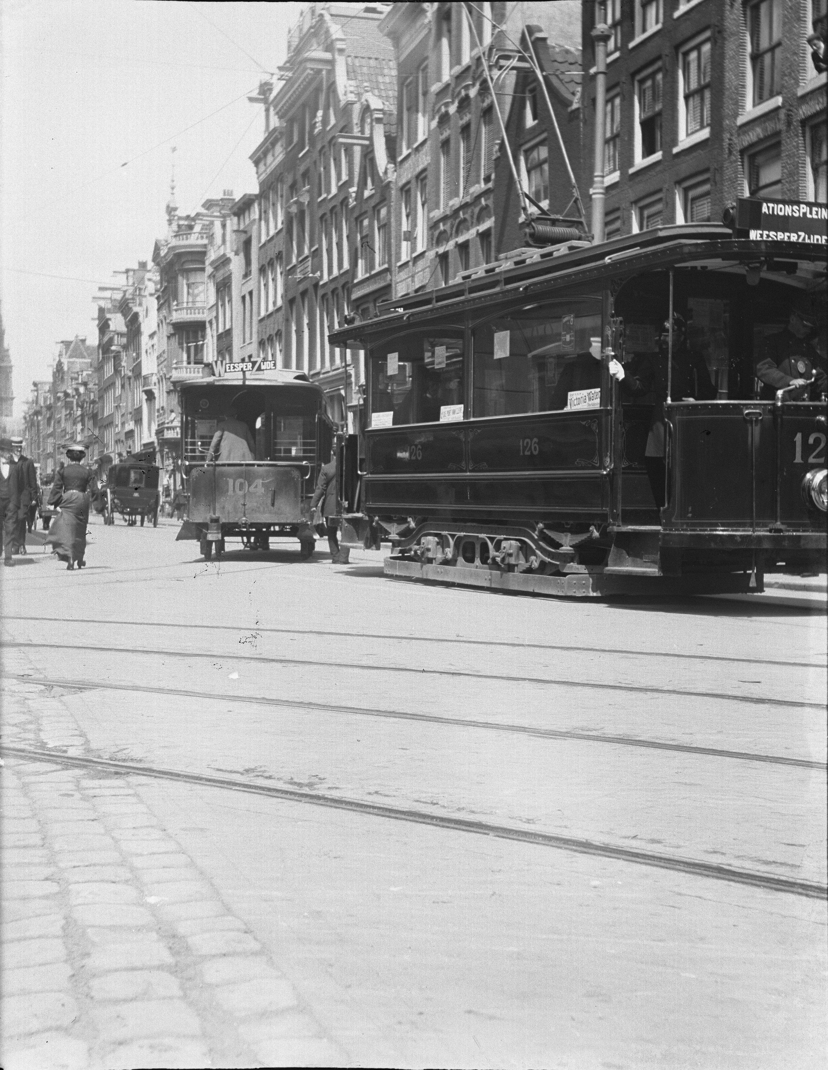 Jodenbreestraat 105-101 en lager (v.r.n.l.) gezien in westelijke richting vanaf de hoek van de Muiderstraat Een paardentram en een elektrische tram kruisen elkaar; tram van lijn 7 (Stationsplein - Weesperzijde; de latere lijn 8; motorwagen 126) en paardentram rijtuig 104.